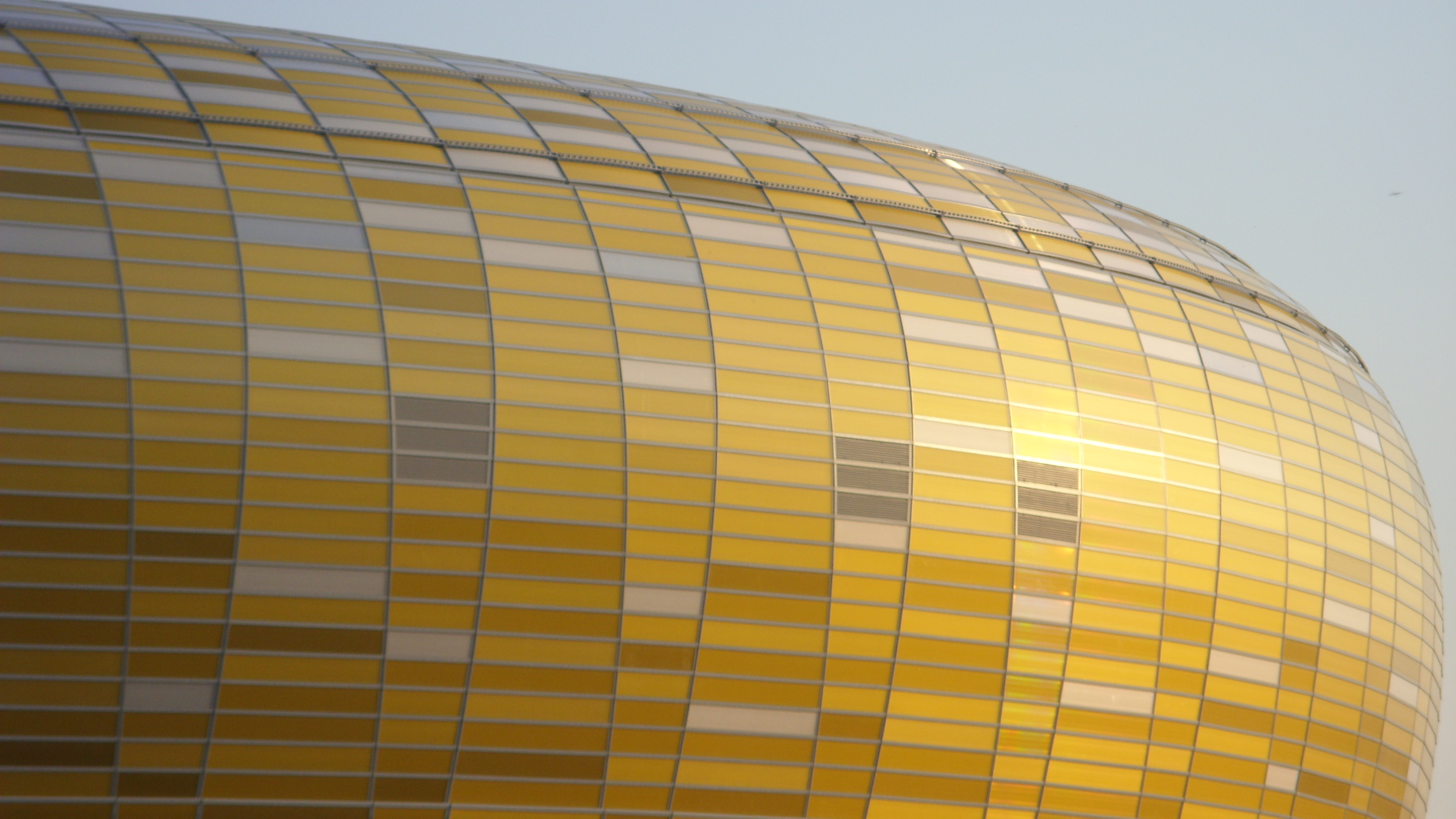 PGE Arena w Gdańsku, 22.05.2011